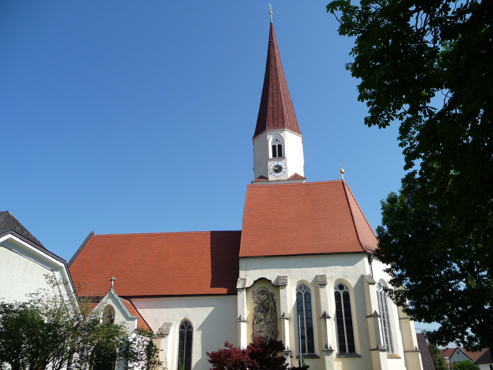 Die Kirche von Sankt Florian am Inn